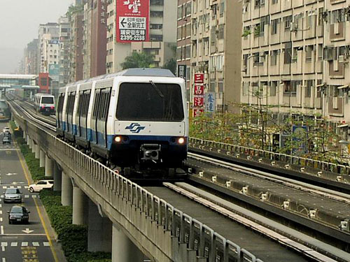 台北捷運木柵線的馬特拉VAL256型電聯車（2003年4月, tksteven自行拍攝）